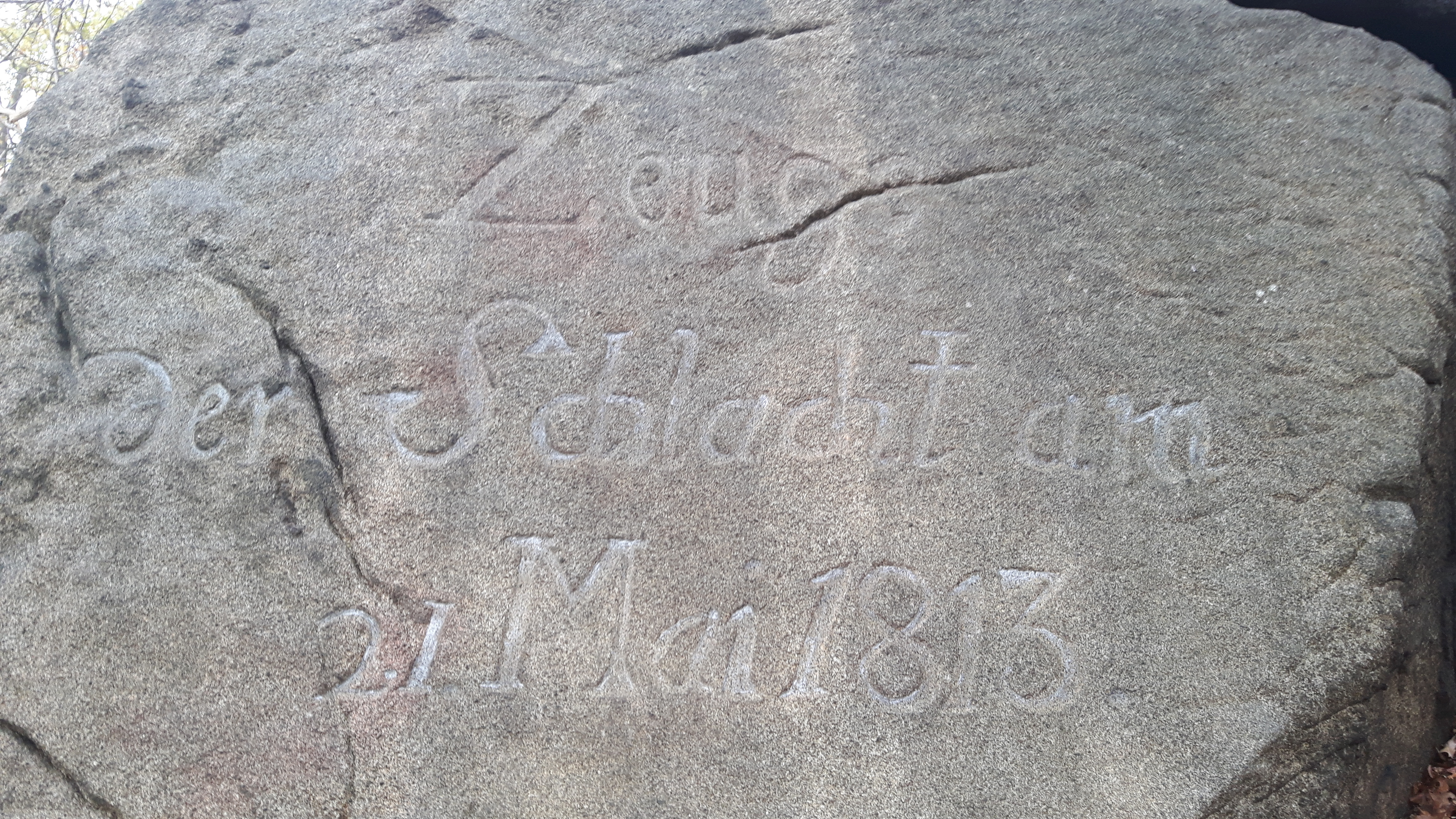 Inschrift auf einem Felsen am Mittelberg in den Kreckwitzer Höhen als Andenken an die Schlacht bei Bautzen am 21.05.1813.